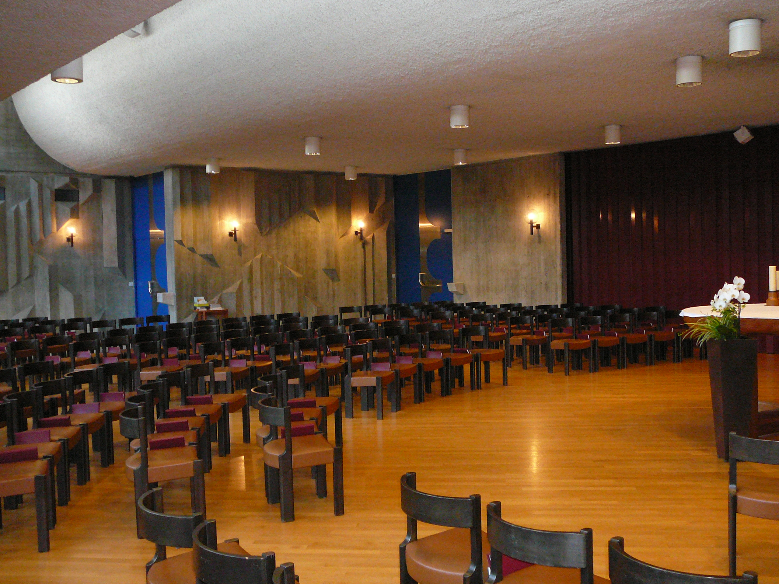 Römisch-katholische Kirche St. Mauritius Regensdorf, Innenansicht